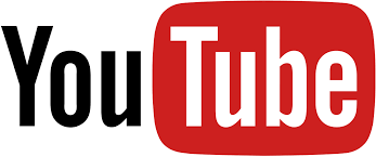 Symbol for youtube